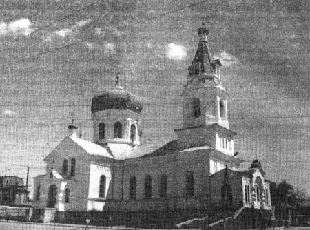 Храм Архангела Михаила в Новочеркасске Области Войска Донского.